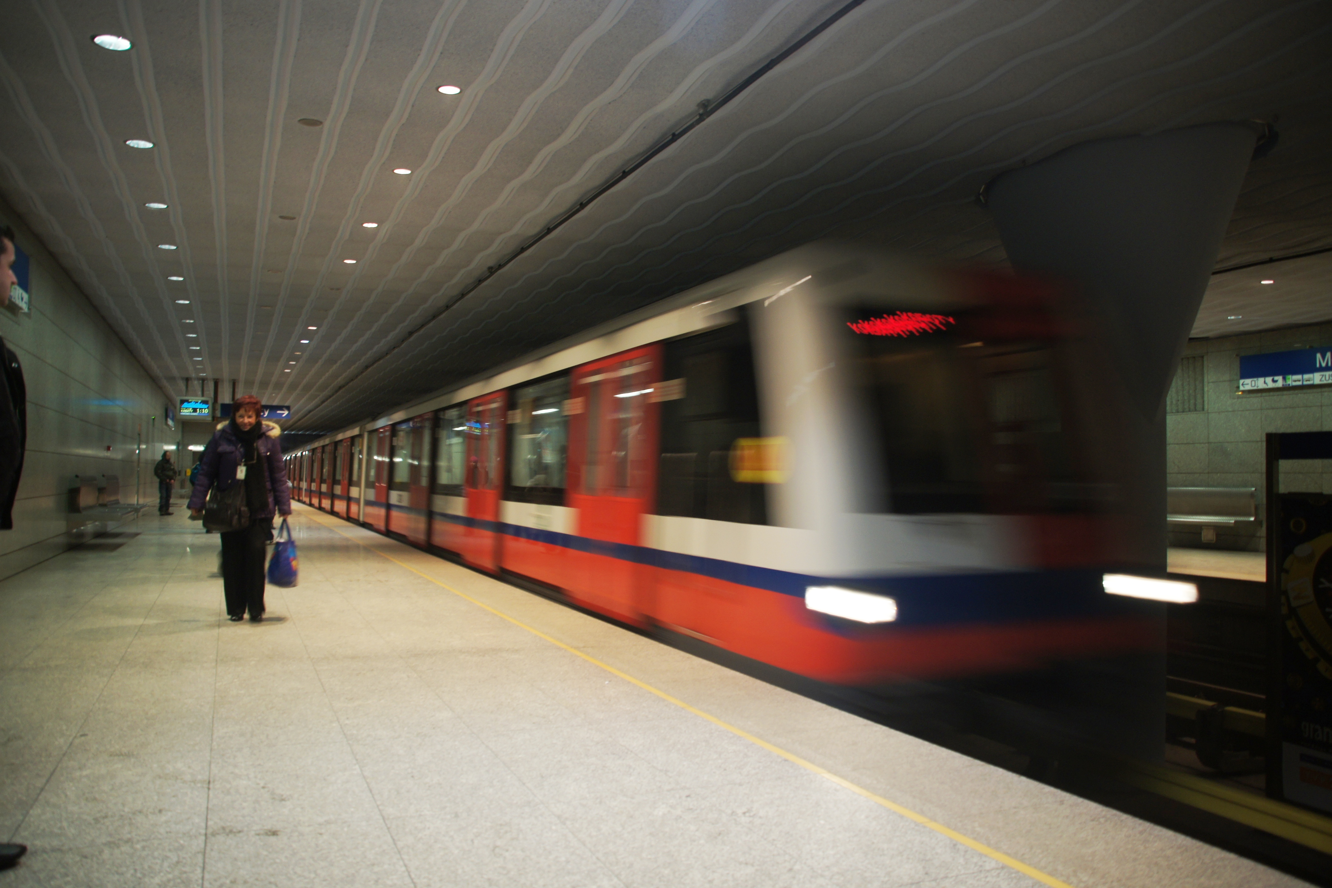 Stacja Metra - Młociny - wjazd pociągu